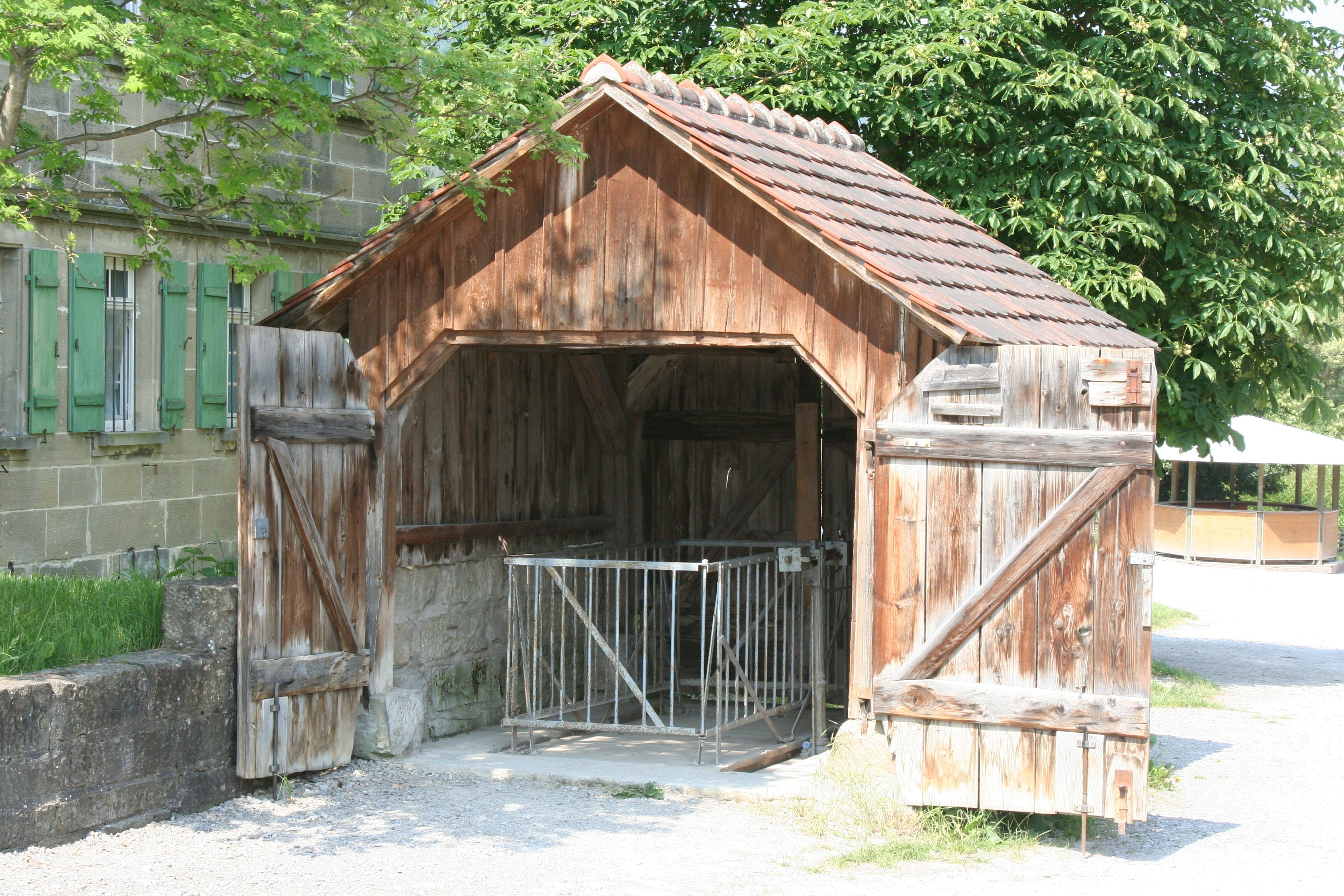 Viehwaage aus Rauenbretzingen im Freilandmuseum Wackershofen